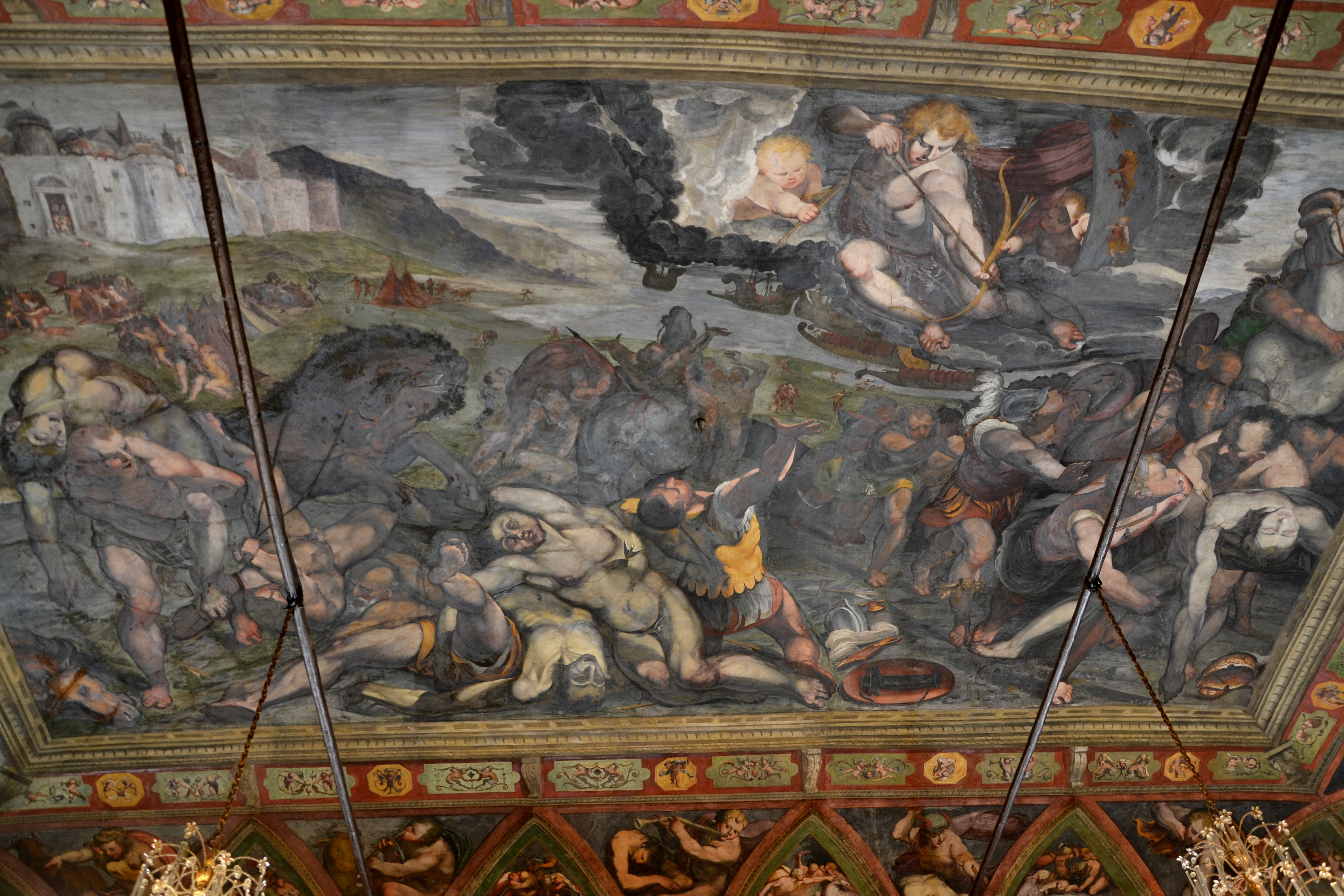 Apollo che saetta i Greci, Affreschi di Luca e Giovanni Cambiaso (1544), Palazzo Doria Spinola (Genoa)